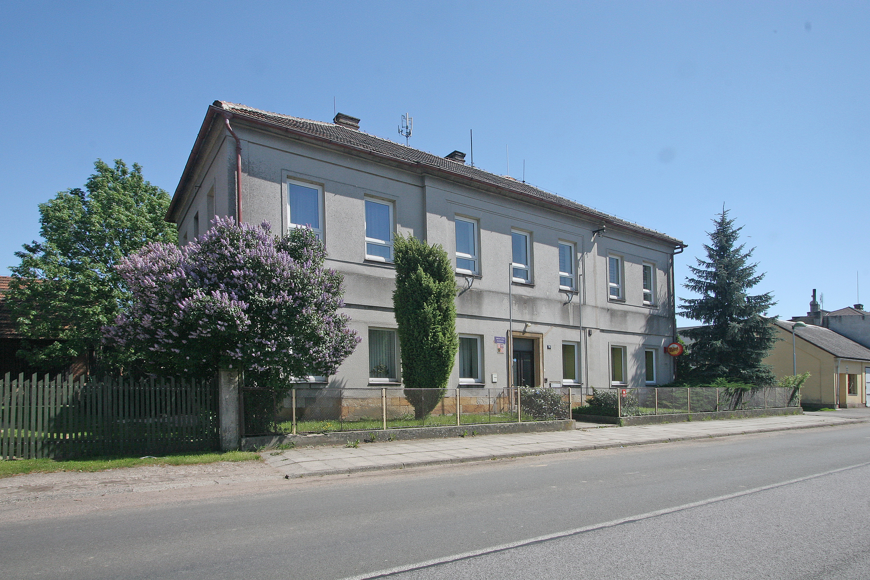 Sukorady obecní úřad